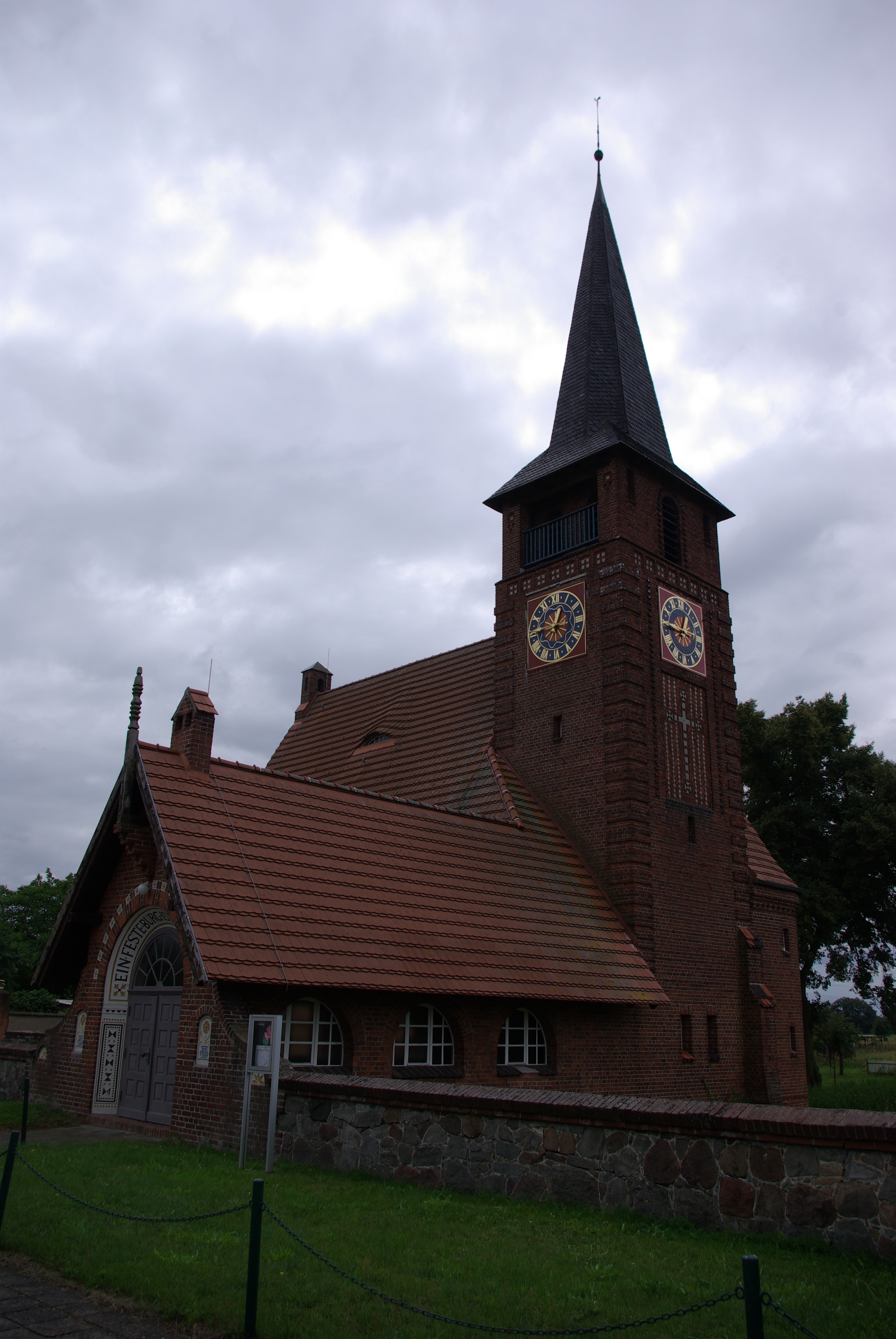 Die Dorfkirche in Bälow (zu Rühstädt), Brandenburg, steht unter Denkmalschutz. Die evangelische Kirche wurde in den Jahren 1914-1915 vom Kgl. Baurat Georg Büttner erbaut.